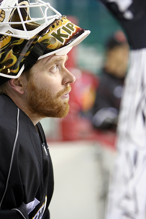 Eishockeytorhüter Miikka Kiprusoff von den Calgary Flames